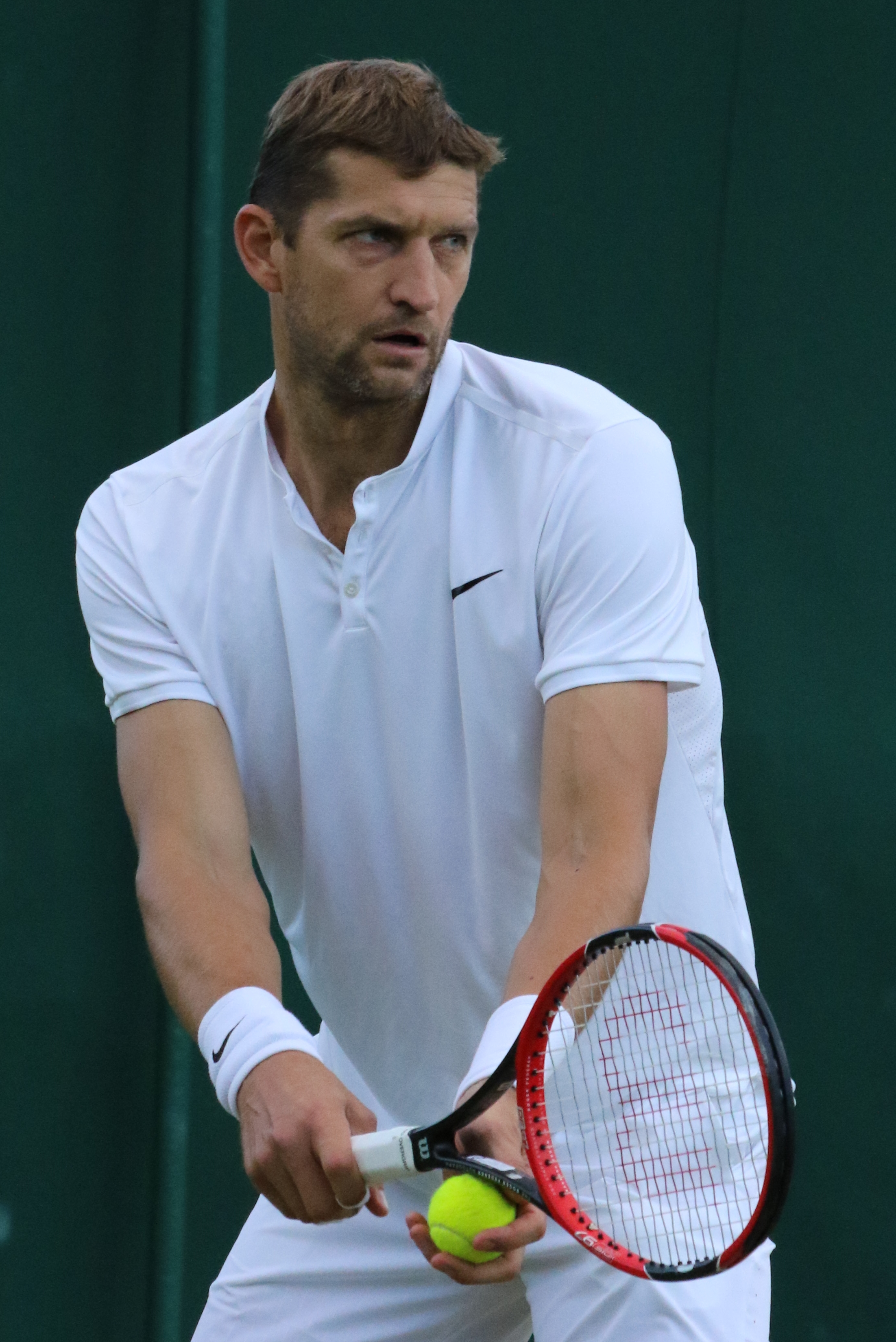 Mirnyi WM16 (6)